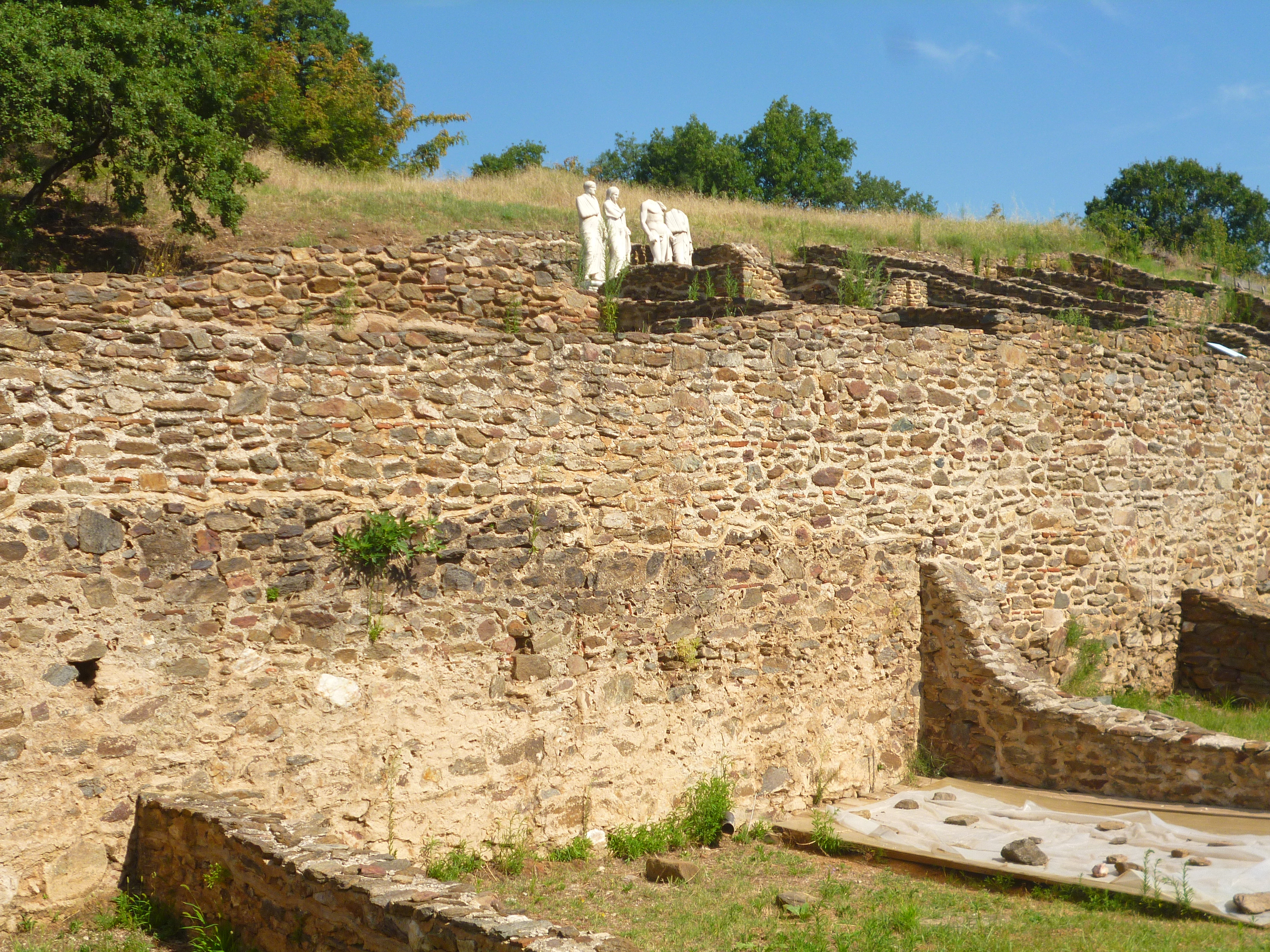 Ίωρον«Ίωρον»